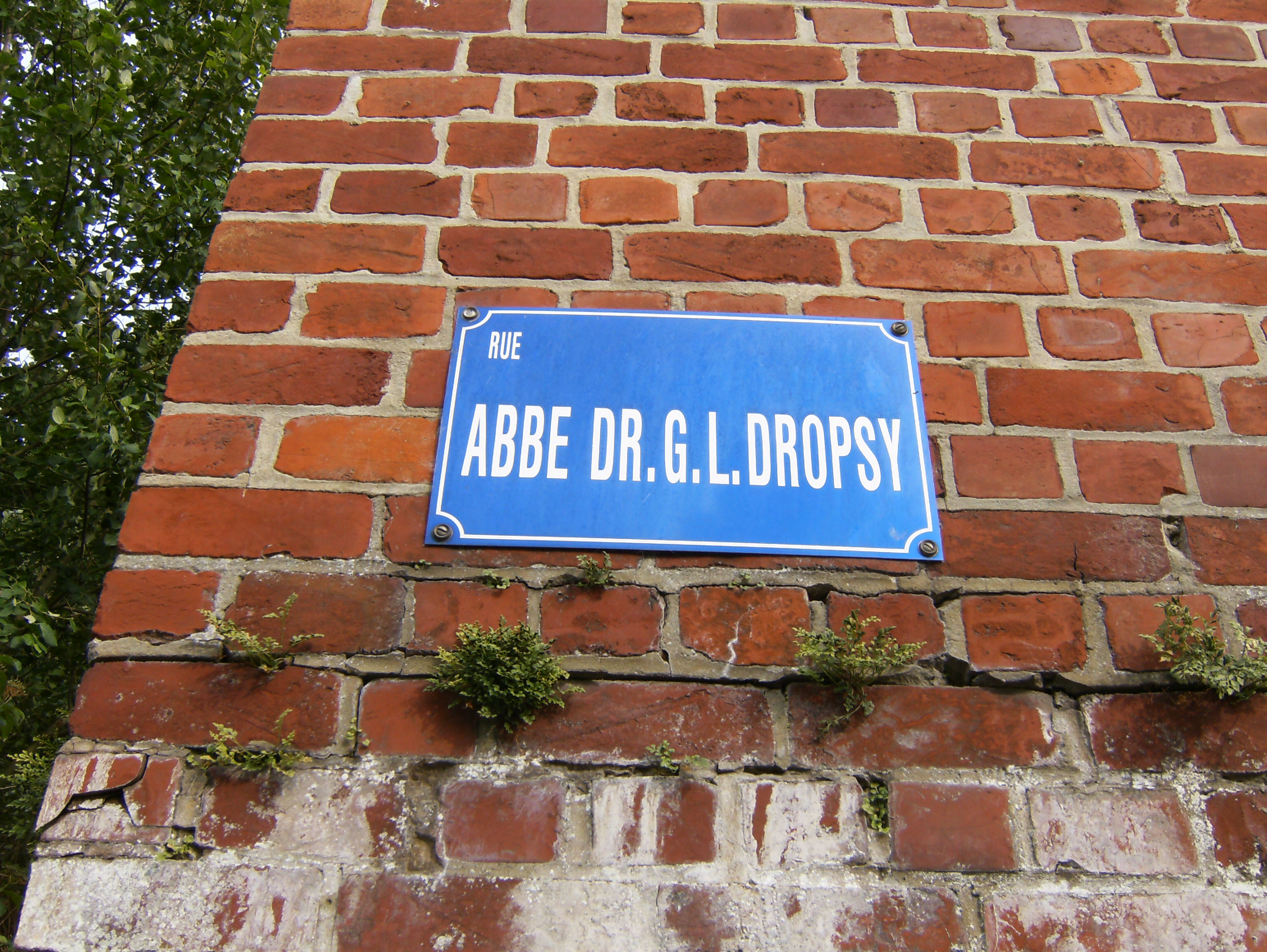 Plaque de la rue Abbé Dropsy à Kain